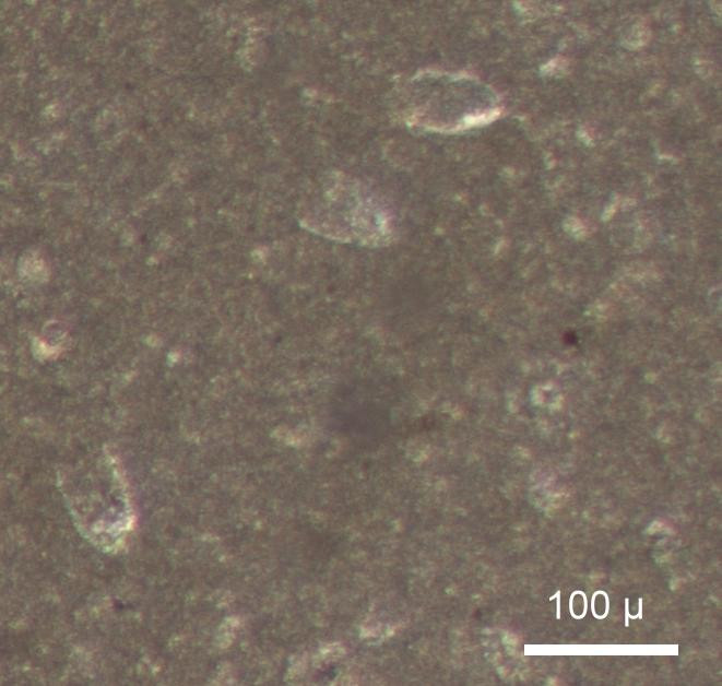 Calpionellen aus obertithonischen Kalken der Ardèche, Frankreich